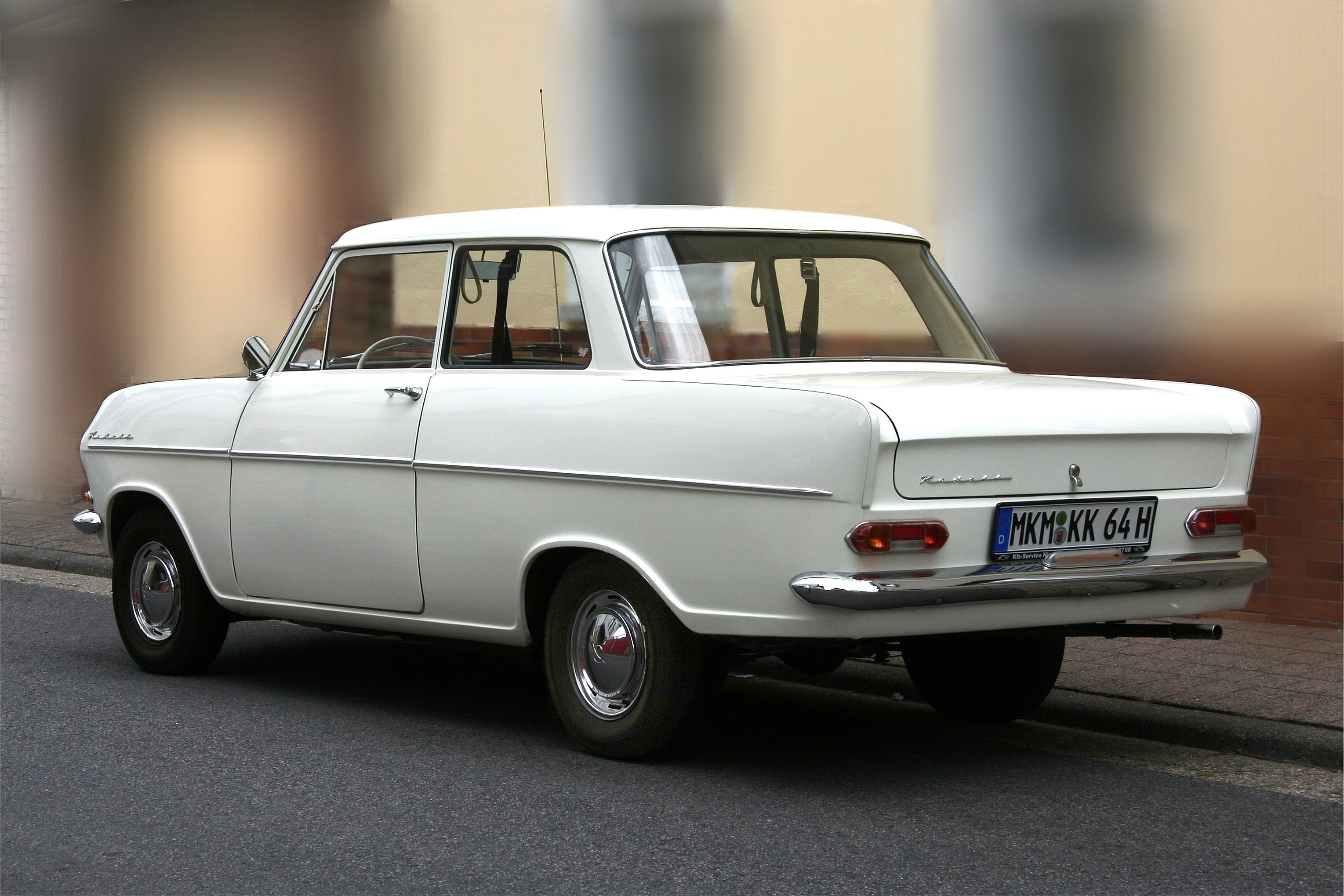 Opel Kadett A, Baujahr 1964 (Fantasiekennzeichen)